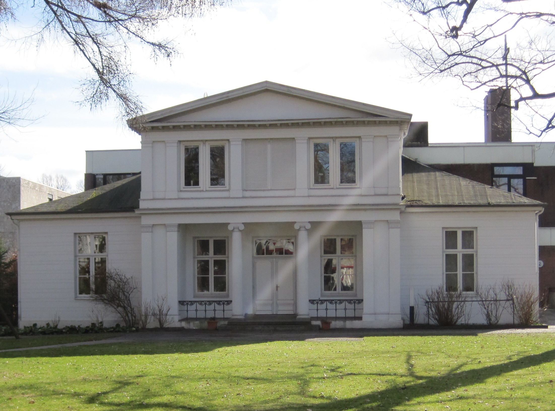 Ehemaliges Gartenhaus in der Vorstadt St. Gertrud, heute von einer freikirchlichen Gemeinde genutzt. Denkmalschutz und Panoramafreiheit.